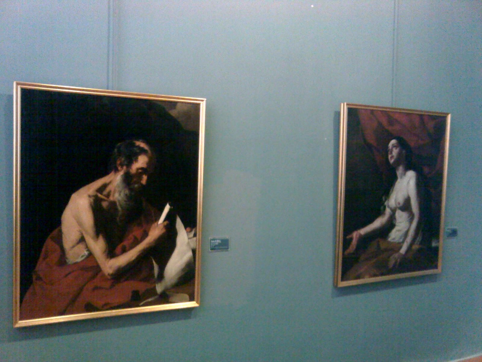 Accademia di Belle Arti di Napoli - La galleria dell'accademia, Jusepe de Ribera San Girolamo (a sinistra) e Mattia Preti Santa Caterina (a destra)